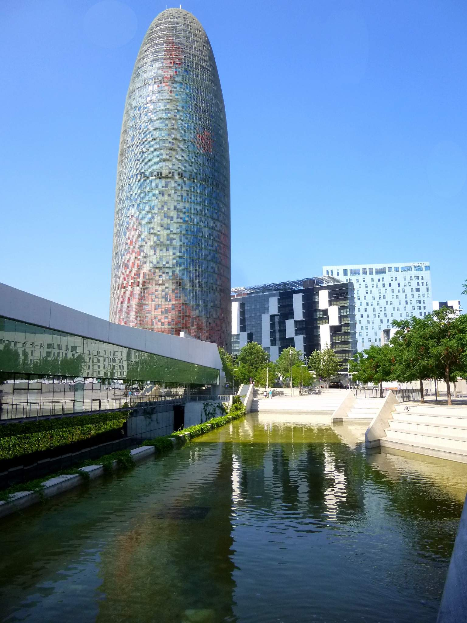 Barcelona - Torre Agbar